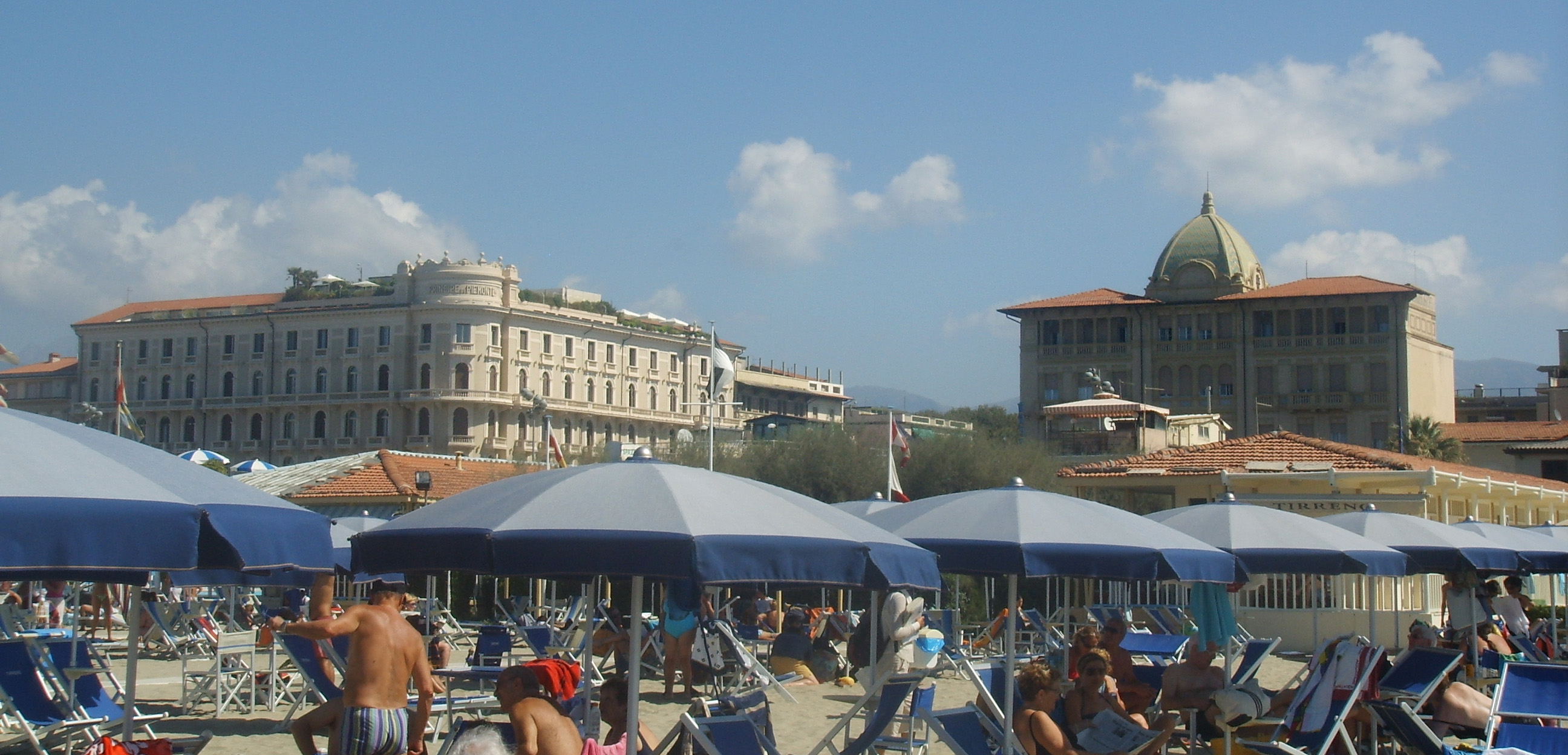 Viareggio, hotel excelsior_e_principe in Viareggio, italy